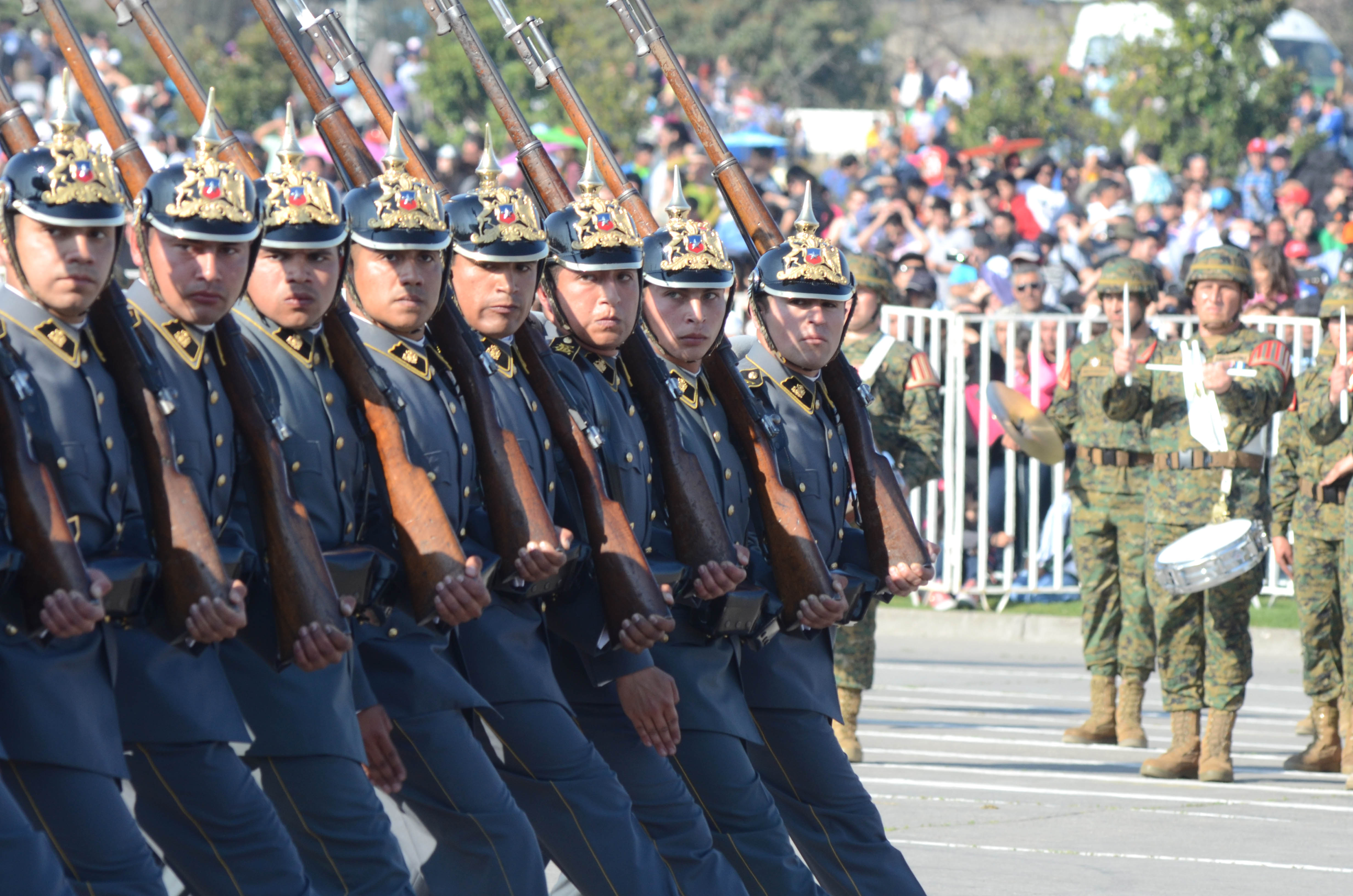 Parada Militar 2014